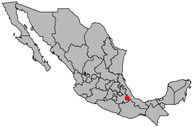 Location of Orizaba, Veracruz, Mexico